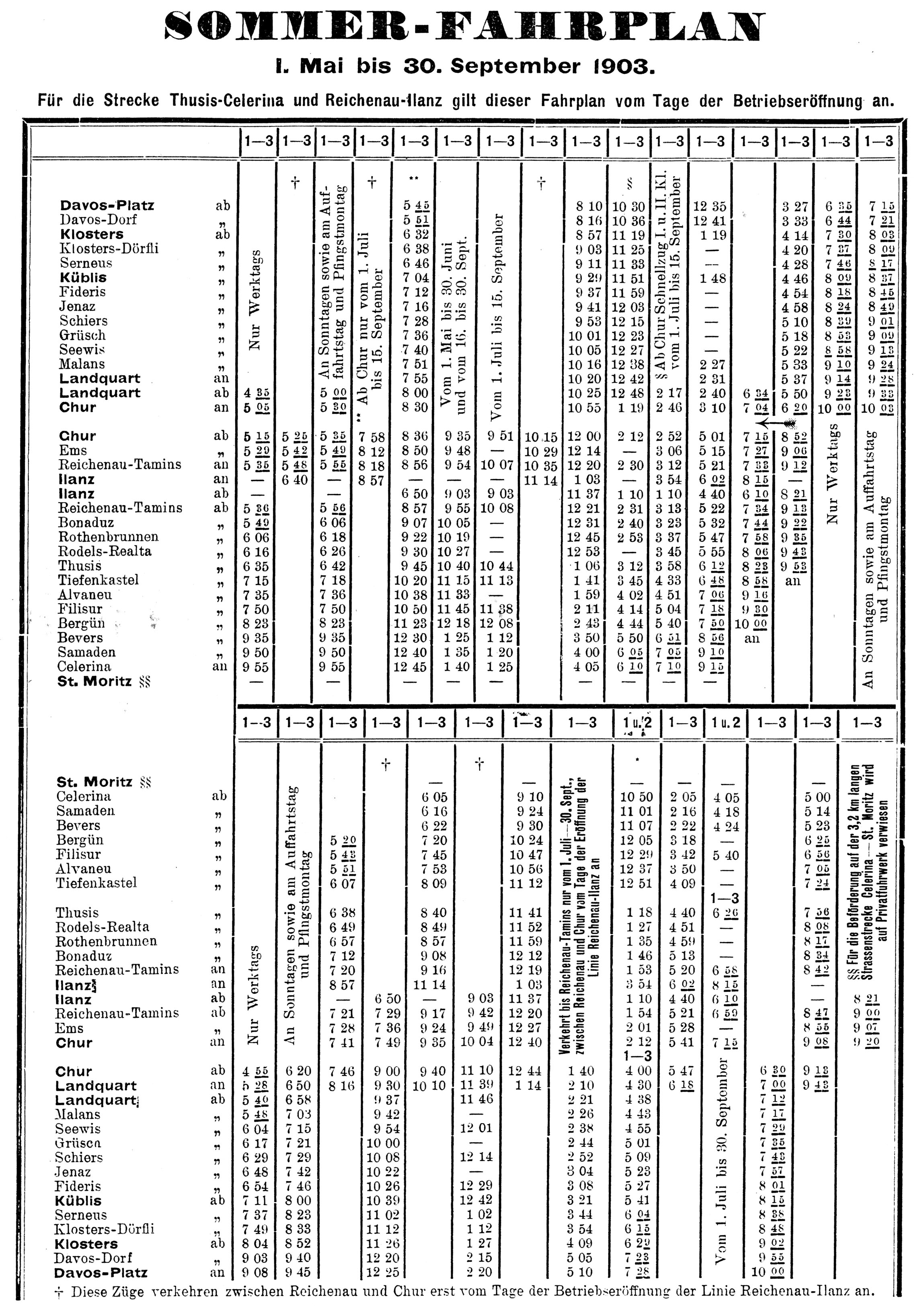 Sommerfahrplan RhB Sommer 1903